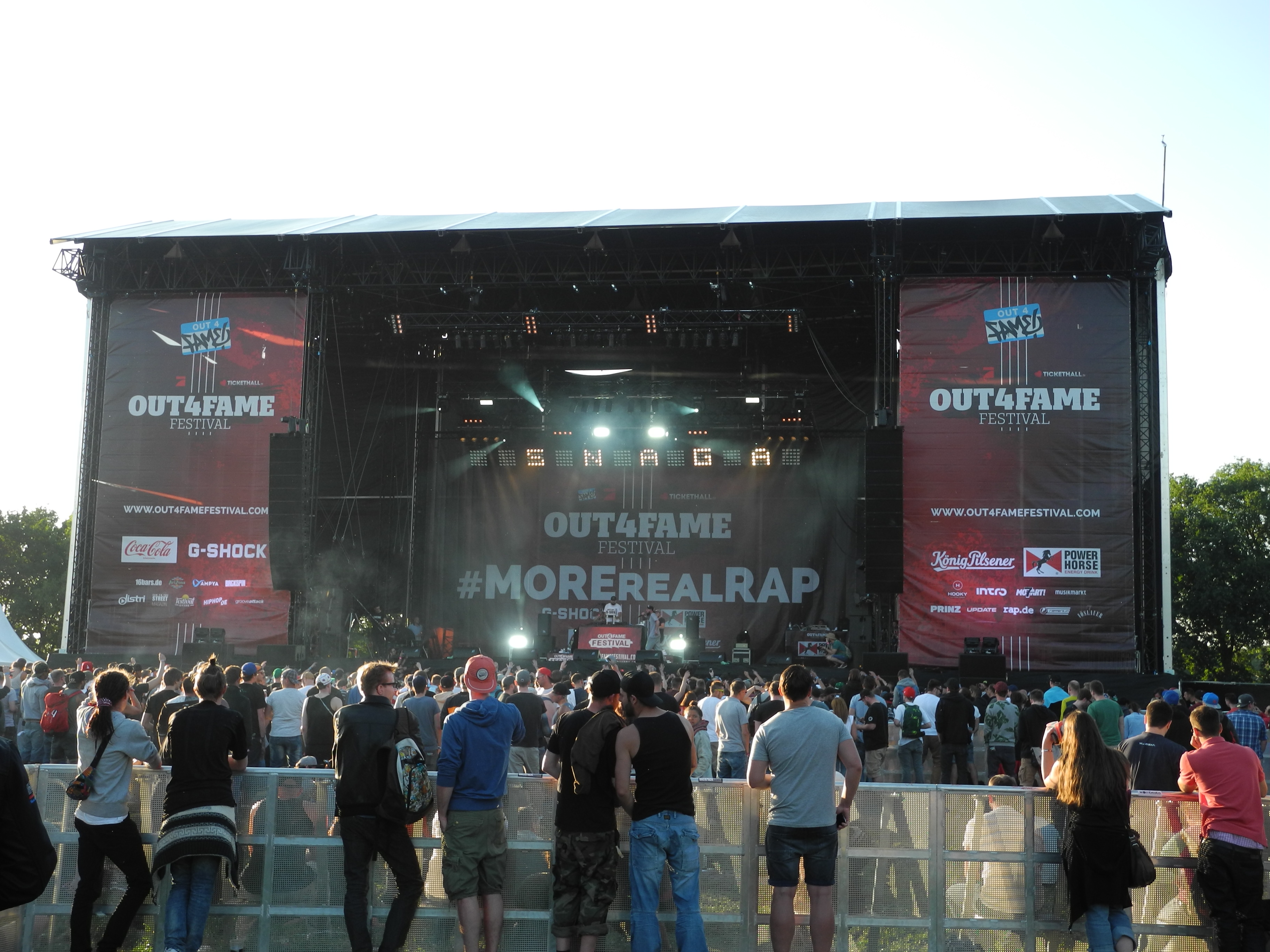 Festivalbühne